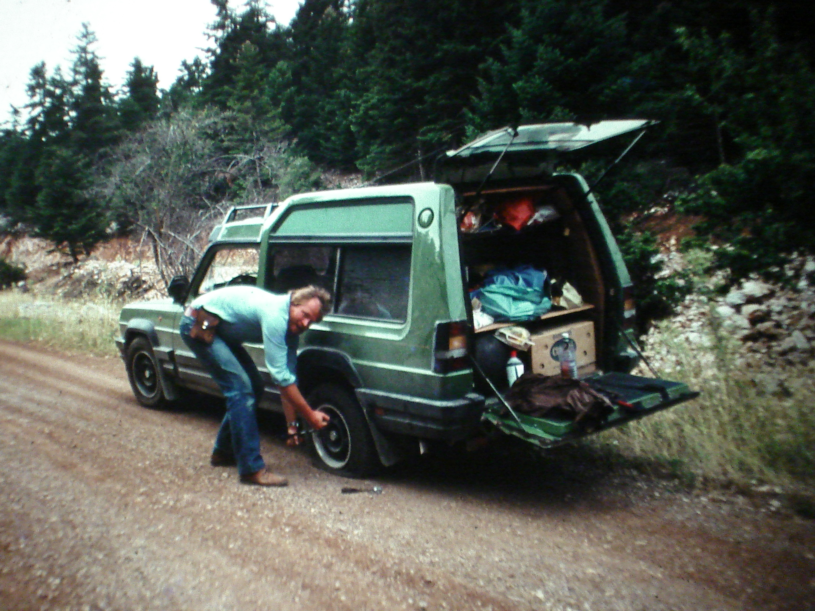 pech